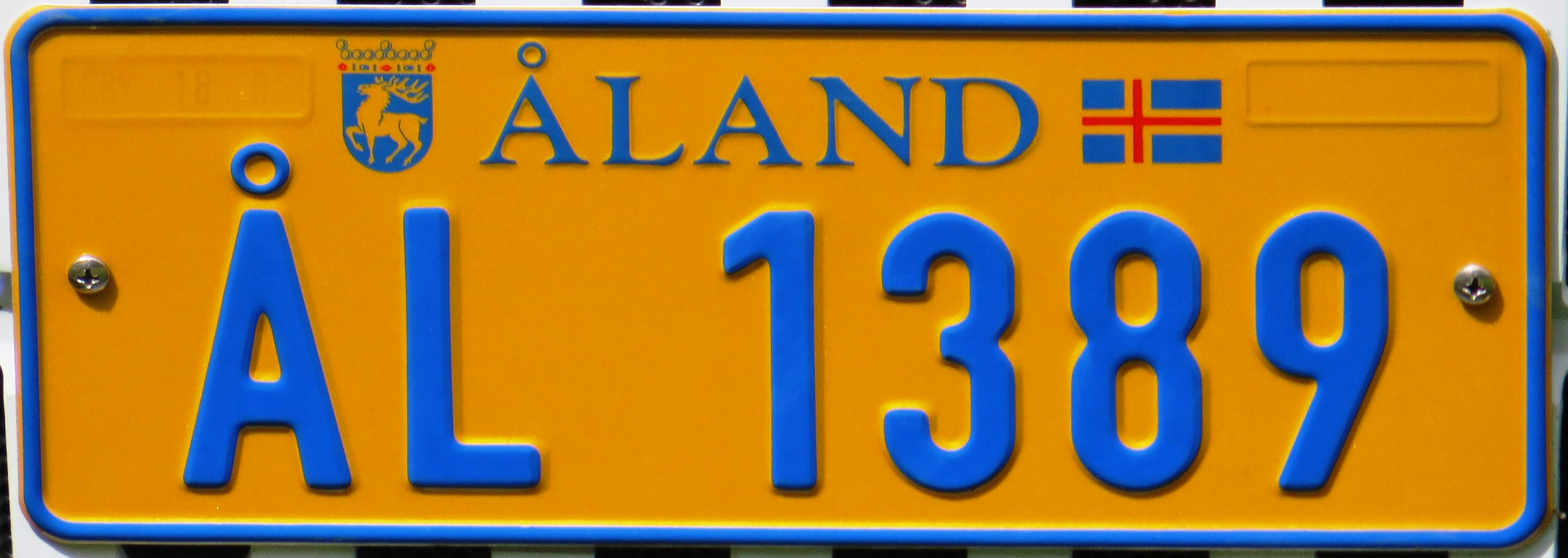 Åland niewe tractor plaat